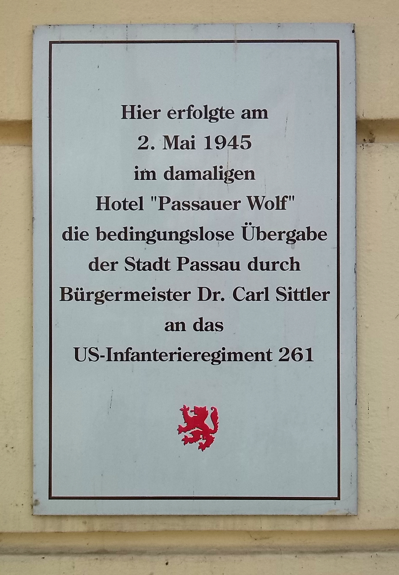 Die Gedenktafel an die Kapitulation Passaus im Mai 1945. Größere Kampfhandlungen fanden aufgrund der frühen Kapitulation in und um Passau nicht statt.